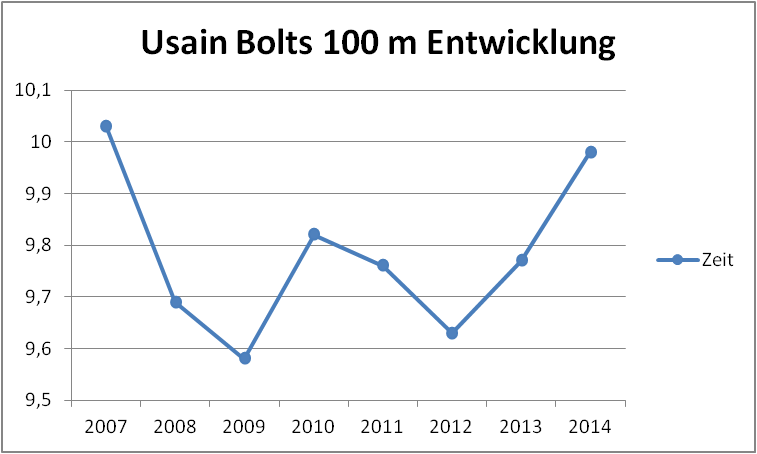 Entwicklung der Saisonbestleistungen von Usain Bolt über 100m erstellt mit Excel, umgewandelt in png